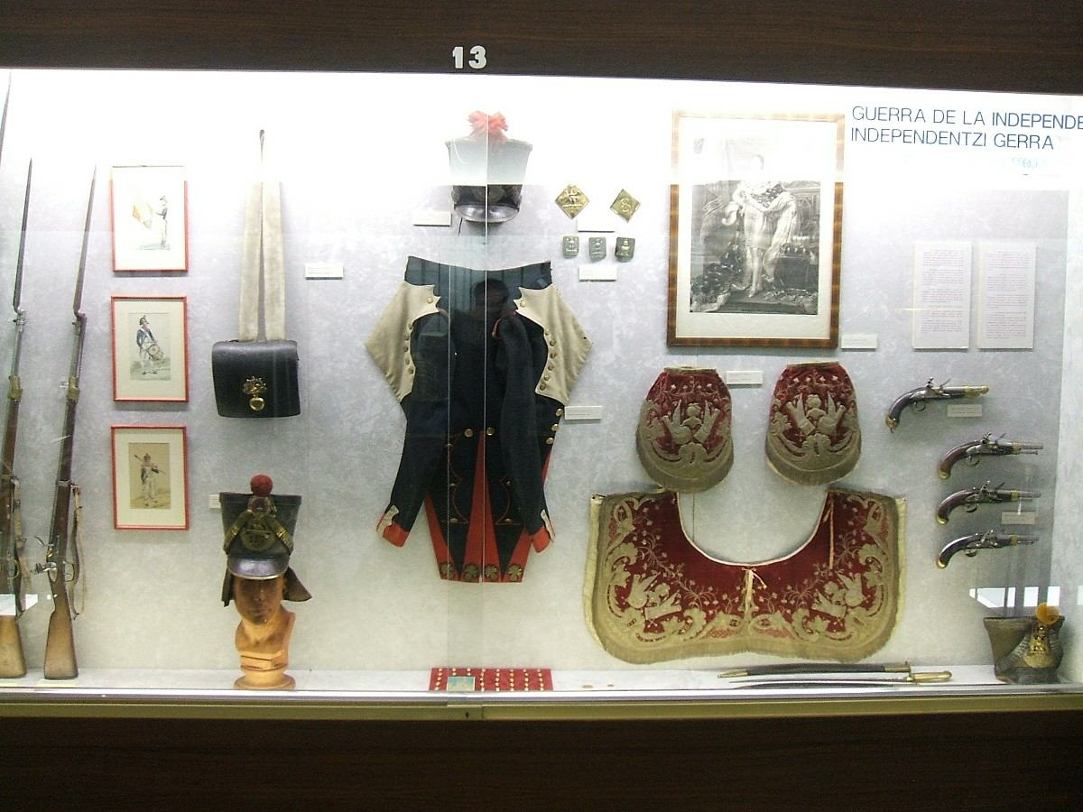 Museo de Armería de Álava, Vitoria-Gasteiz, País Vasco, España. Vitrina dedicada a la Guerra de la Independencia Española.